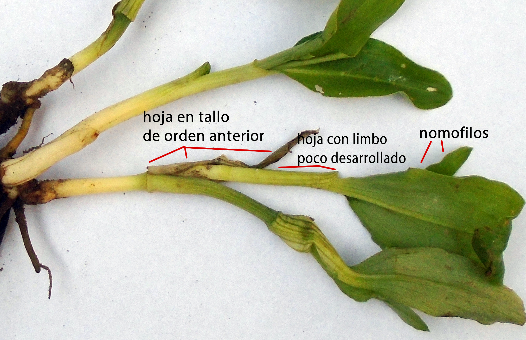 Commelina erecta rama axilar y sucesión foliar (con etiquetas).